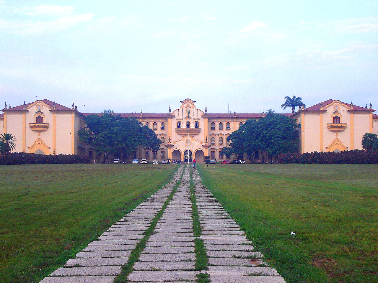 Prédio Principal da UFRRJ